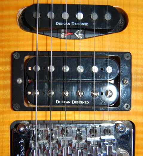 Un pick-up single-coil ed uno humbucker Duncan Designed montati su una Jackson DK-2.